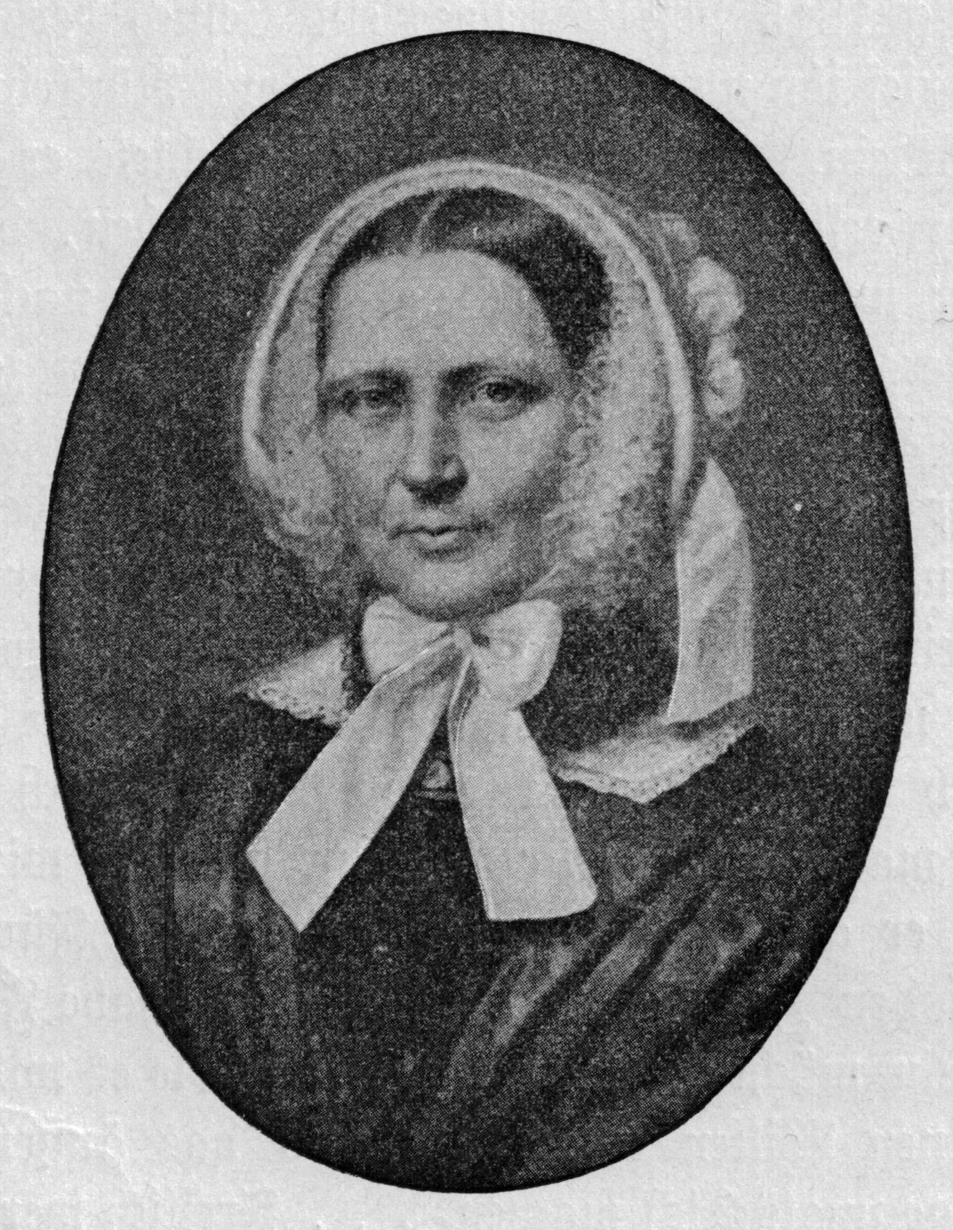 Anna Maria Schleiermacher (1786–1869)